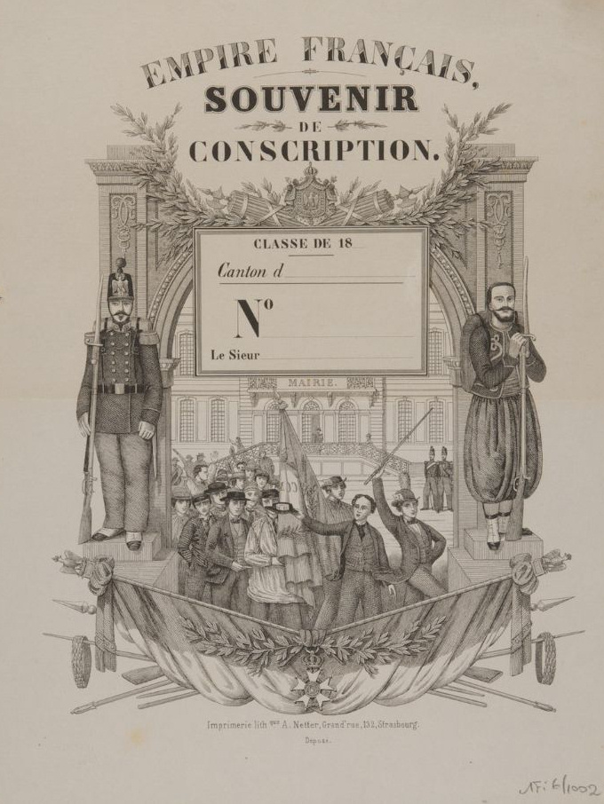 Souvenir de conscription conservé aux Archives départementales du Bas-Rhin